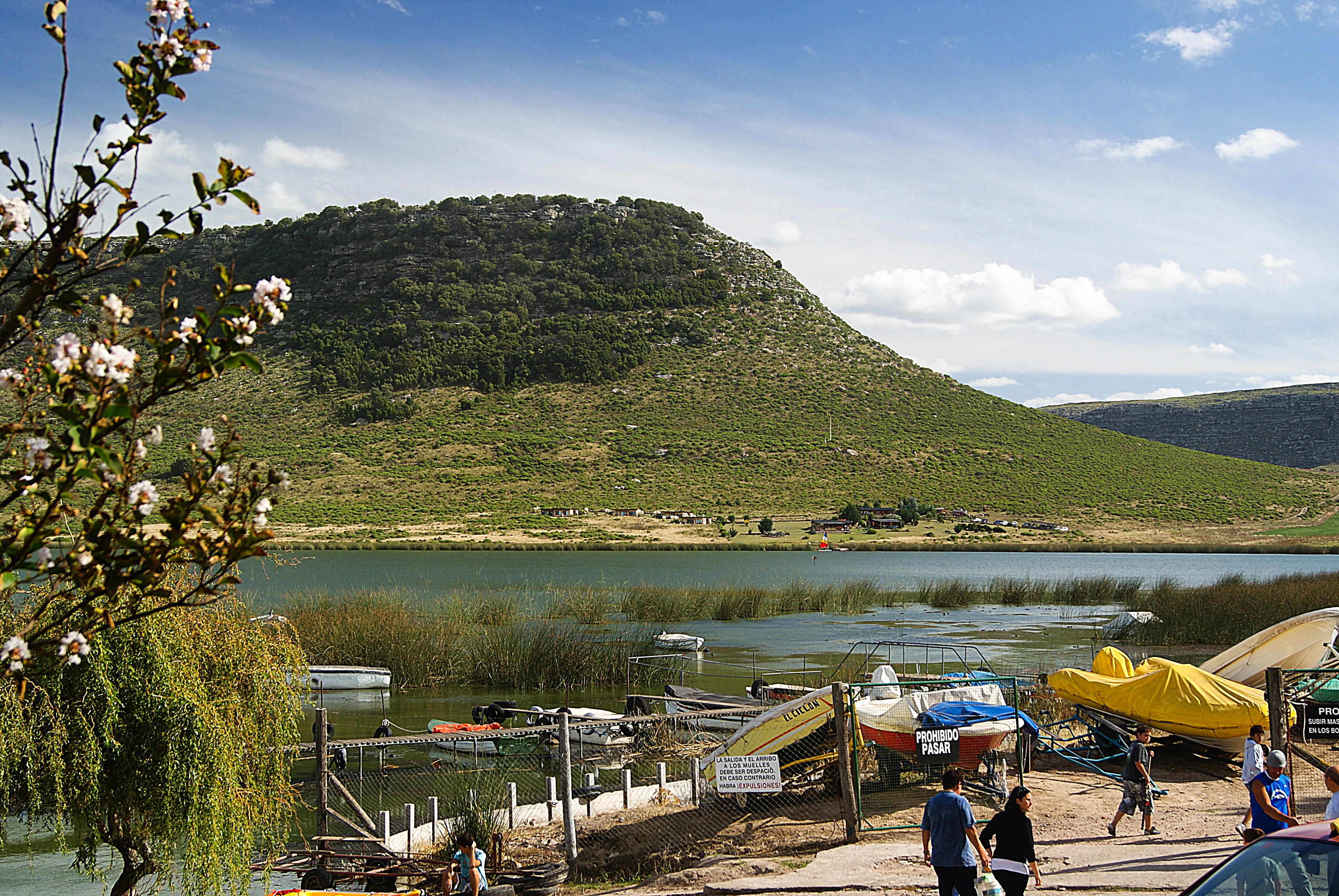 Villa Laguna La Brava